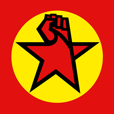 Devrimci Hareket logosu